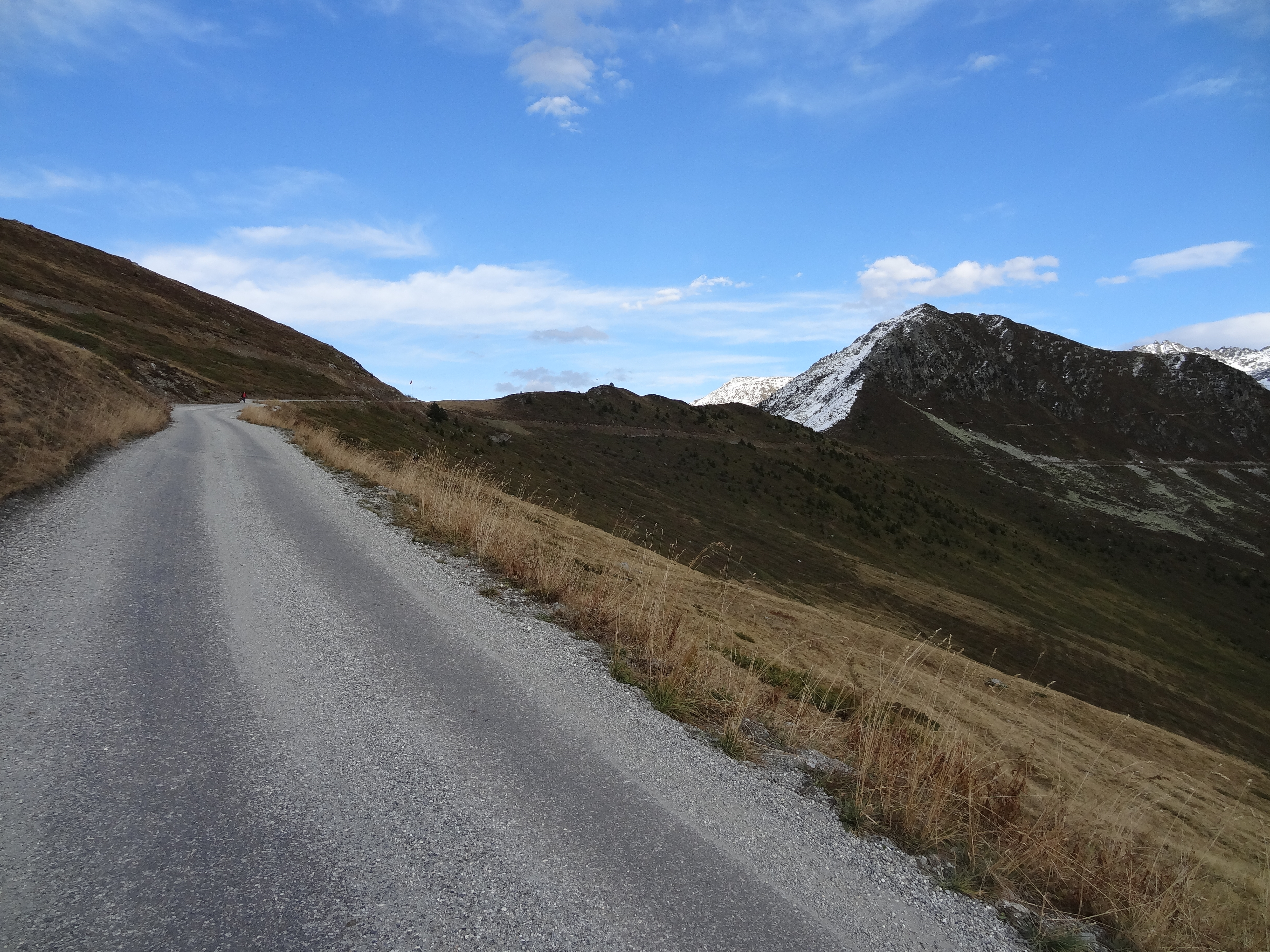 Croix de Coeur's area on fall